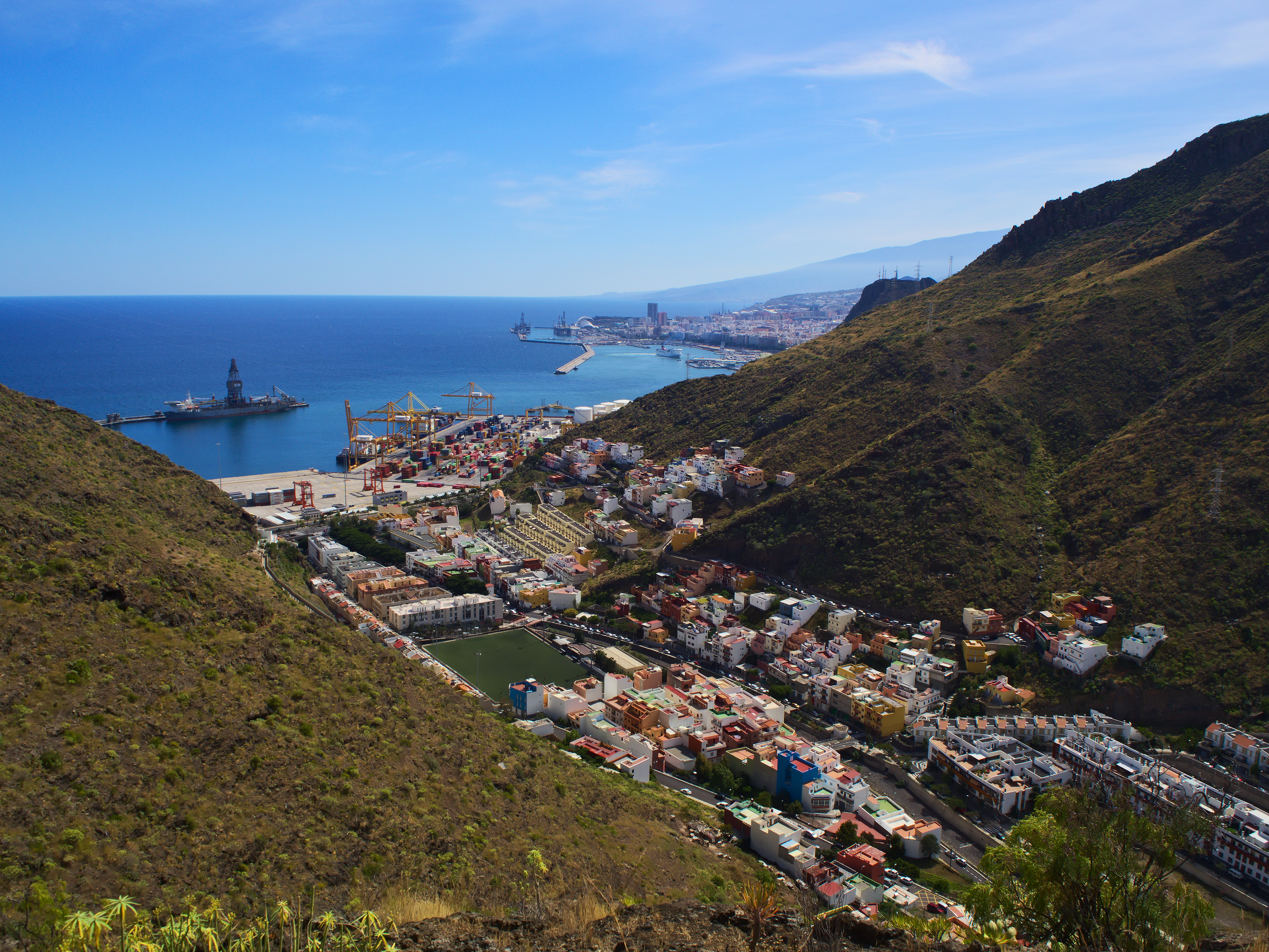 Barrio de María Jiménez visto desde el camino que sube al Lomo de las Canteras en la margen izquierda del Barranco del Bufadero.